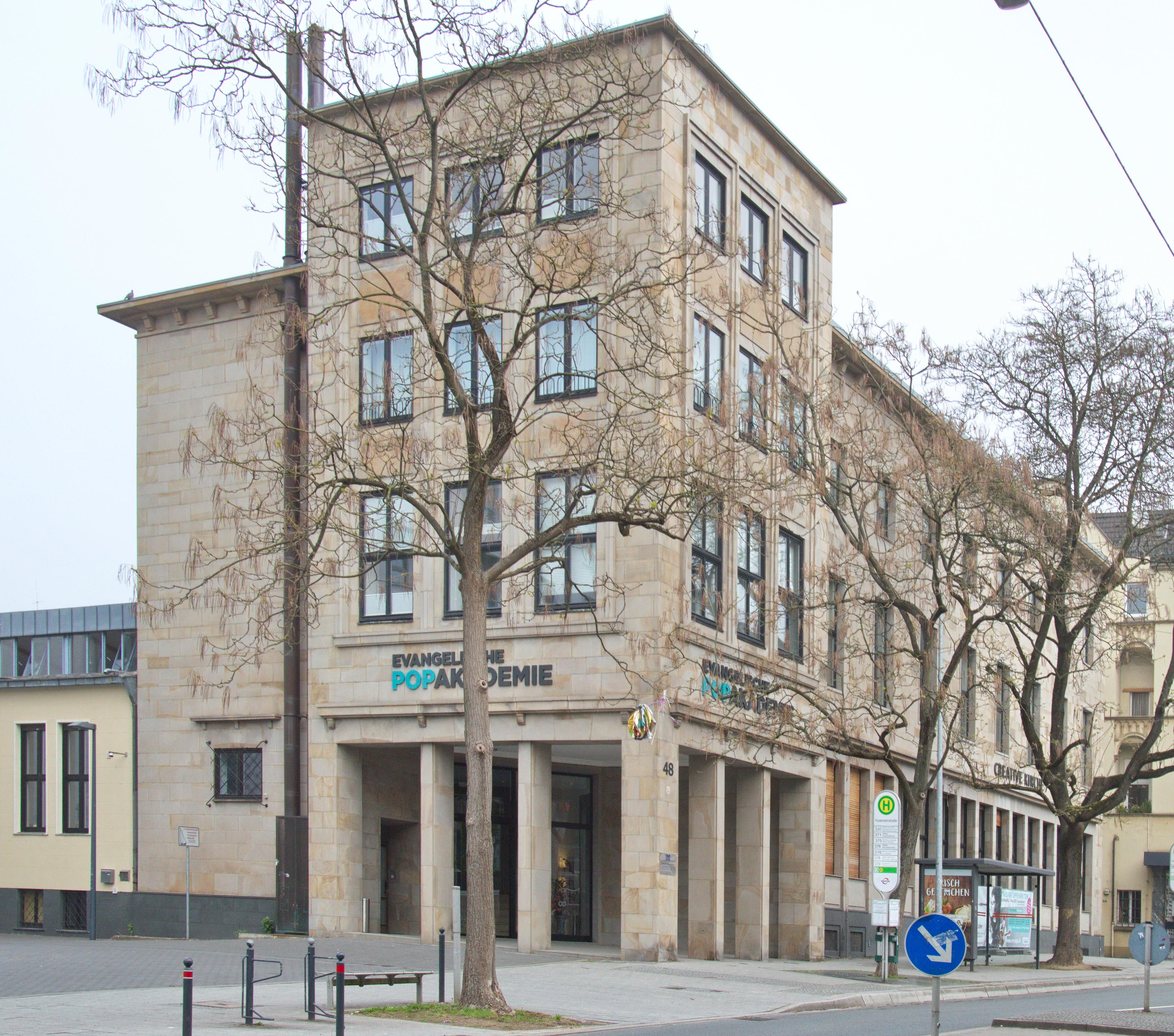 Evangelische Popakademie und Sitz der Firma Crosscan